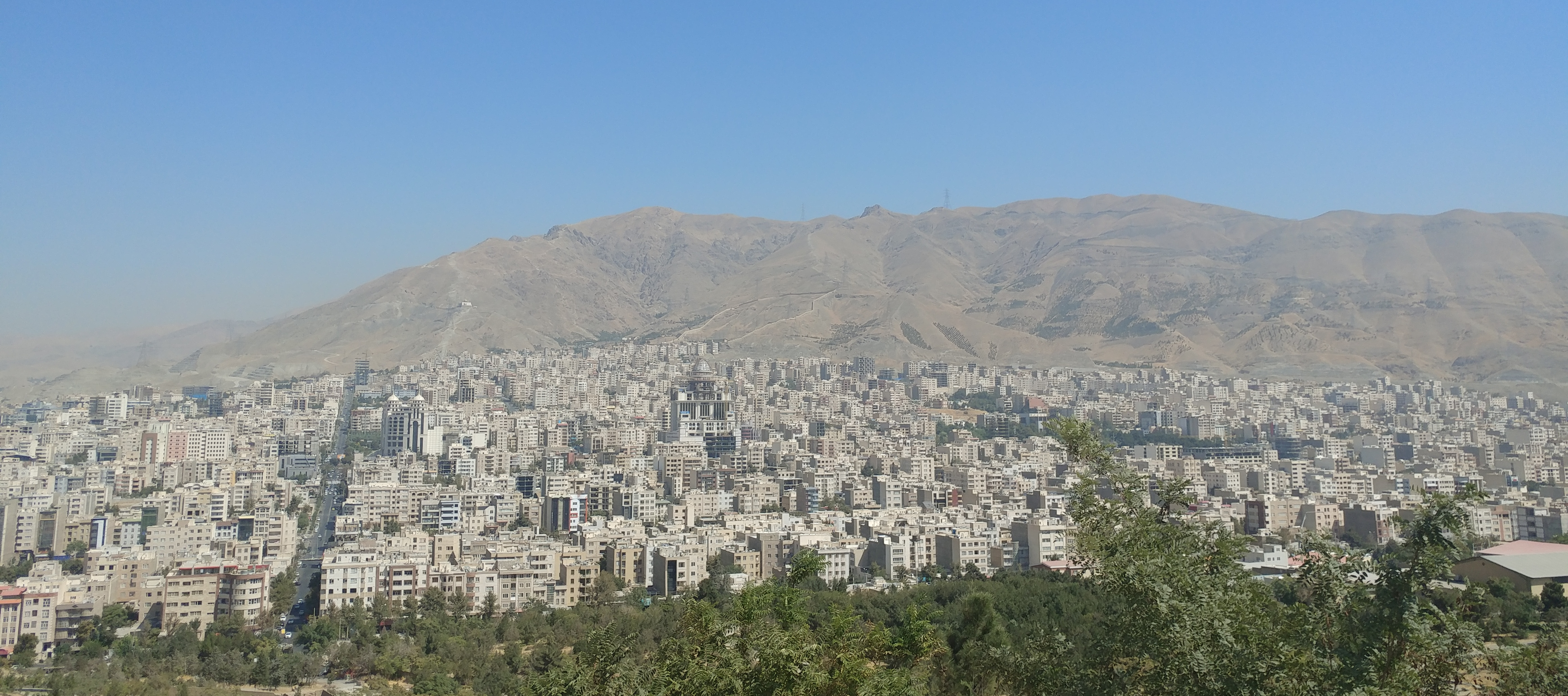 نمای هوایی منطقه عظیمیه کرج از جنوب به شمال